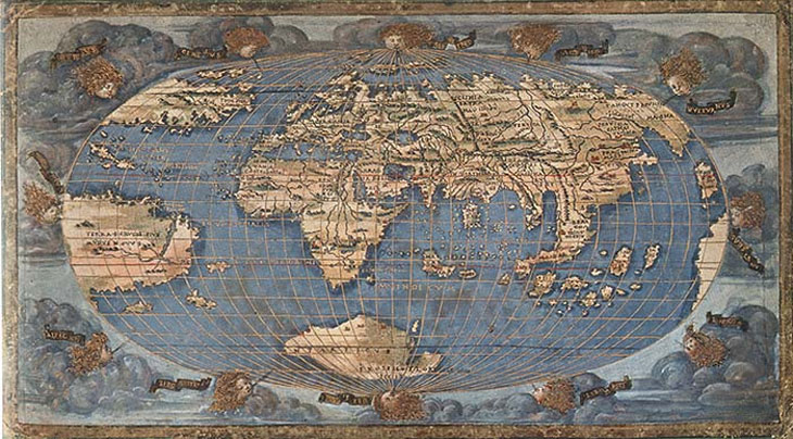 Mapamundi de proyección oval. Grabado en lámina de cobre sobre pergamino, iluminado al temple. Museo Marítimo Nacional de Greenwich.